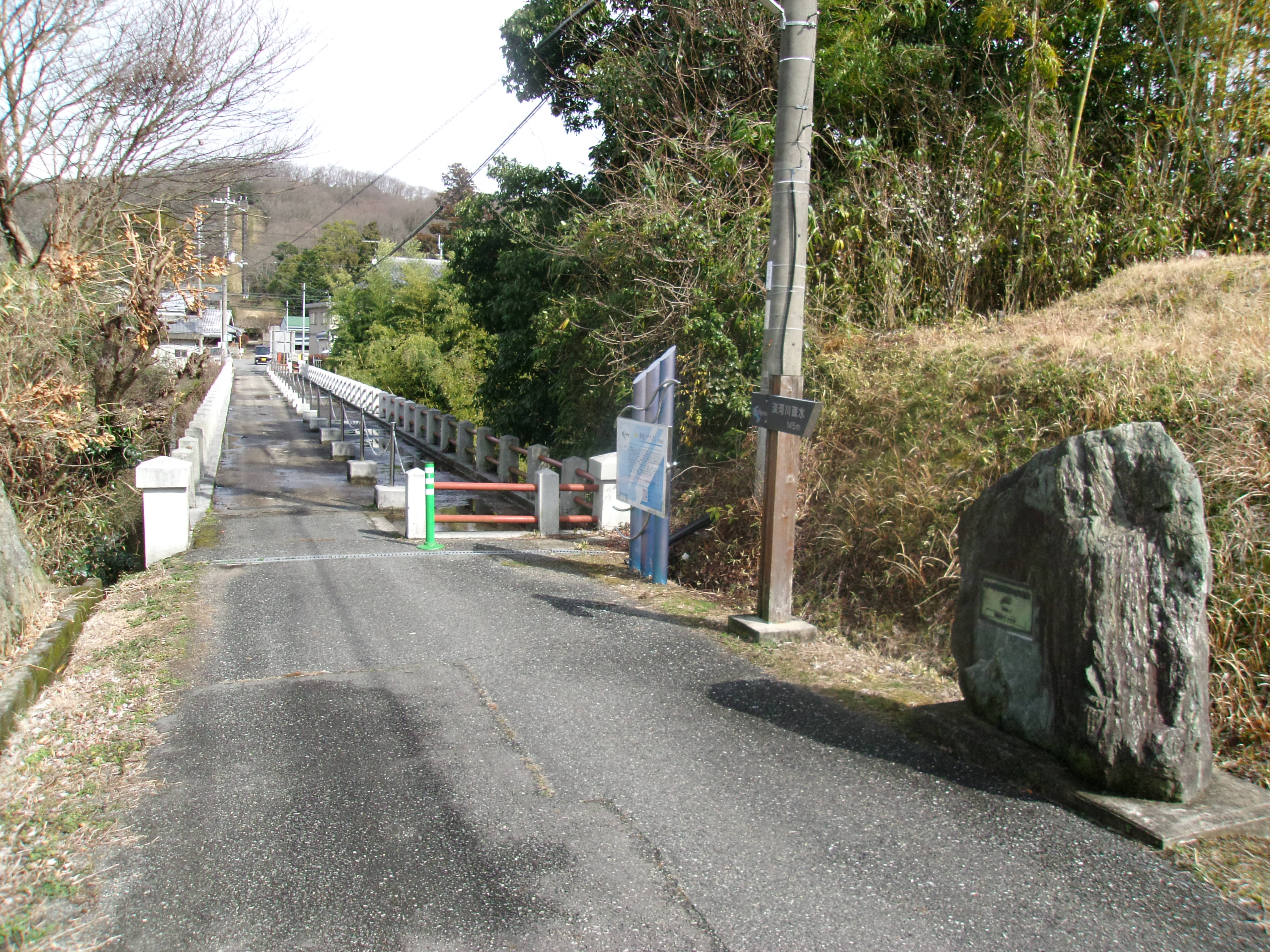 淡河疎水の御坂サイフォン橋（橋梁上部の道路面と石碑）